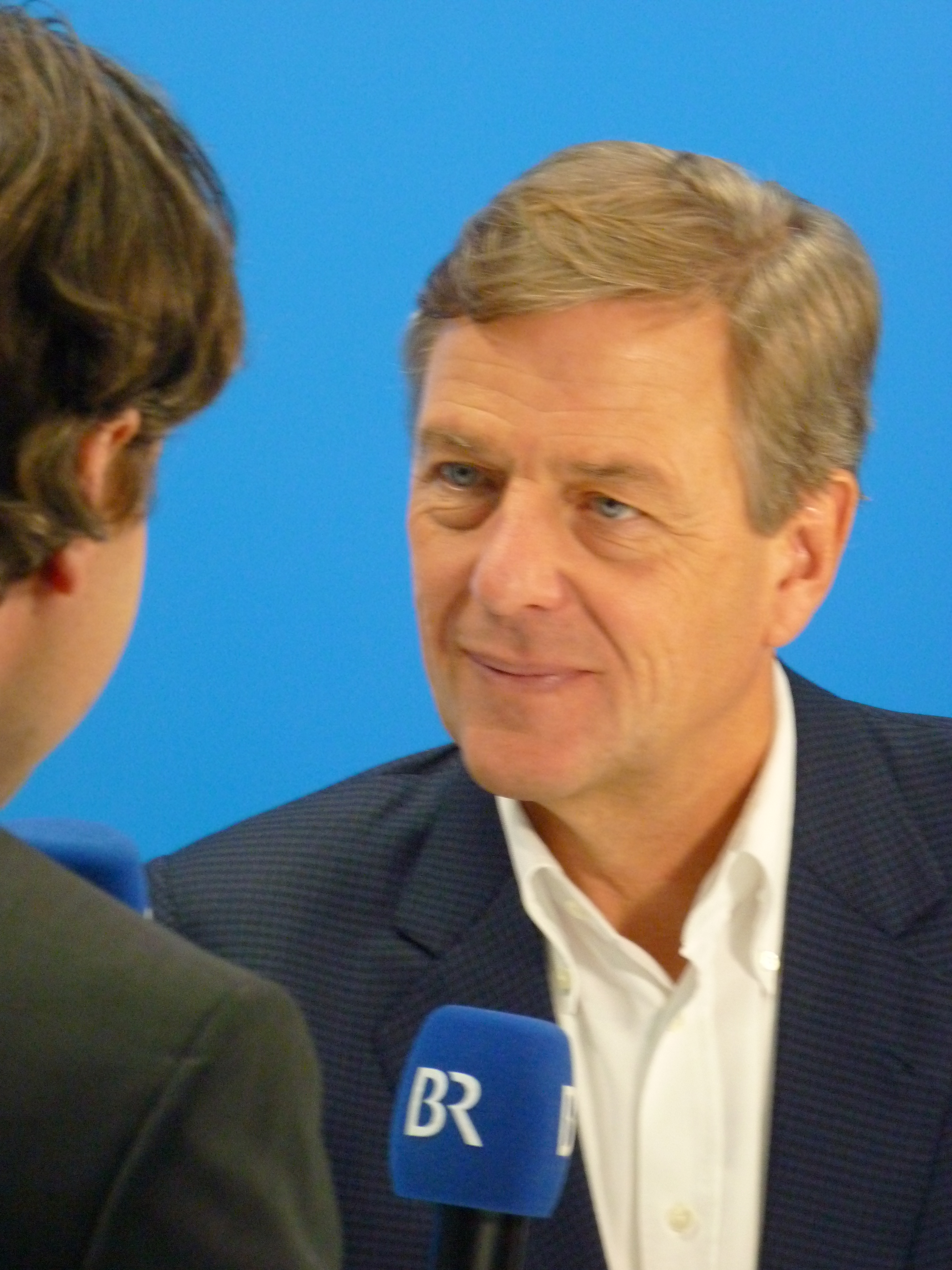 Claus Kleber bei den Medientagen 2014 in München